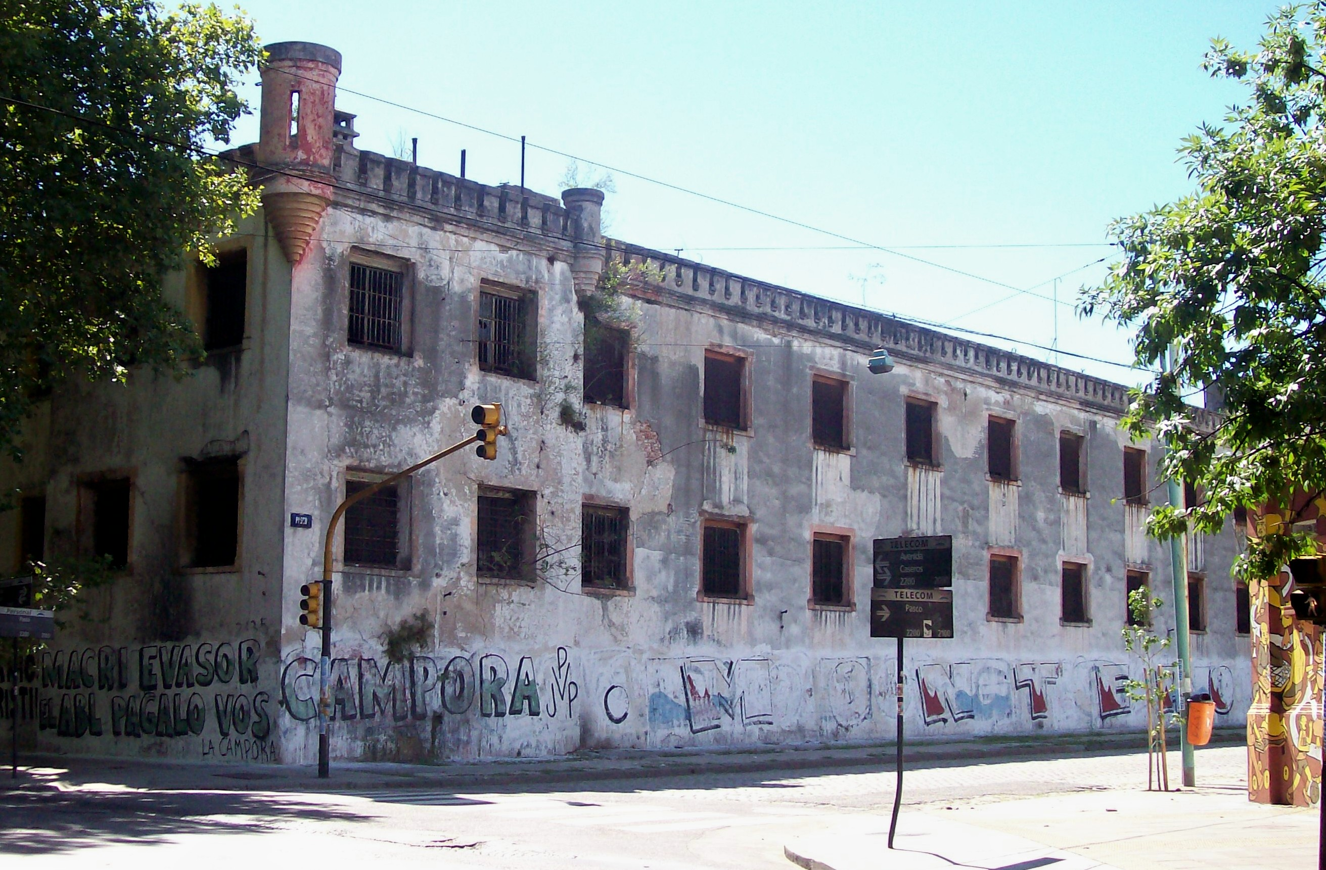 Vieja y demolida cárcel en el barrio de Parque (de los) Patricios, Buenos Aires, Argentina. En la Avenida Caseros y Pasco, esquina NO. Foto tomada SE a NO (aprox)